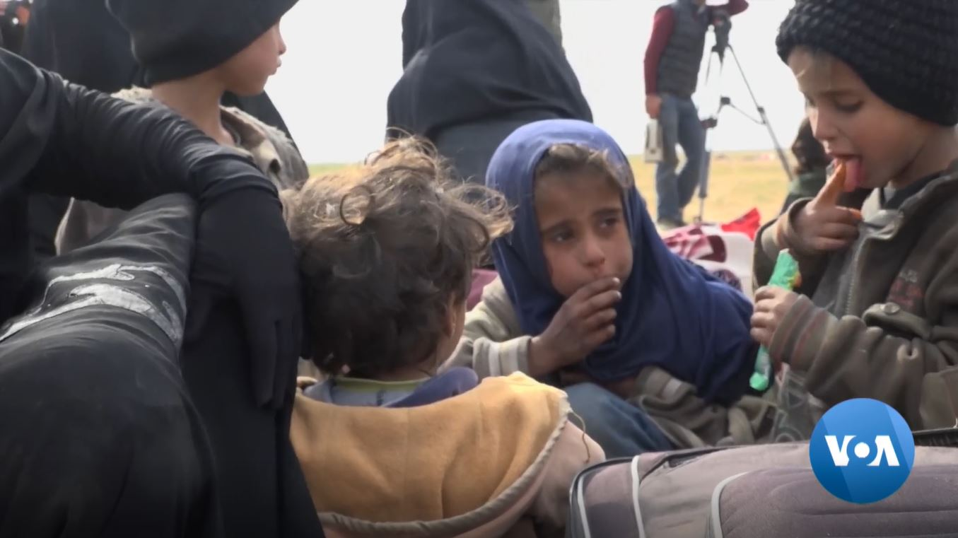 Bataille de Baghouz entre les Forces démocratiques syriennes et l'État islamique, fin février 2019.